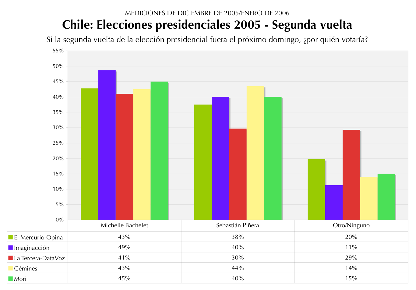 Fue creada por mí mismo. Cantus.